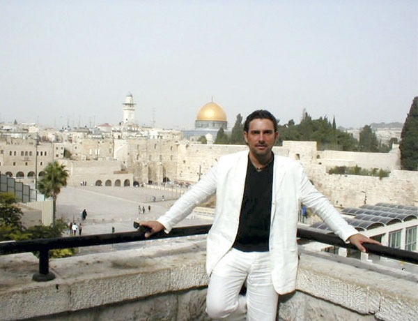 הארי גייטנר באתר הסרט "סינדרום ירושלים" של ויקטור בראון